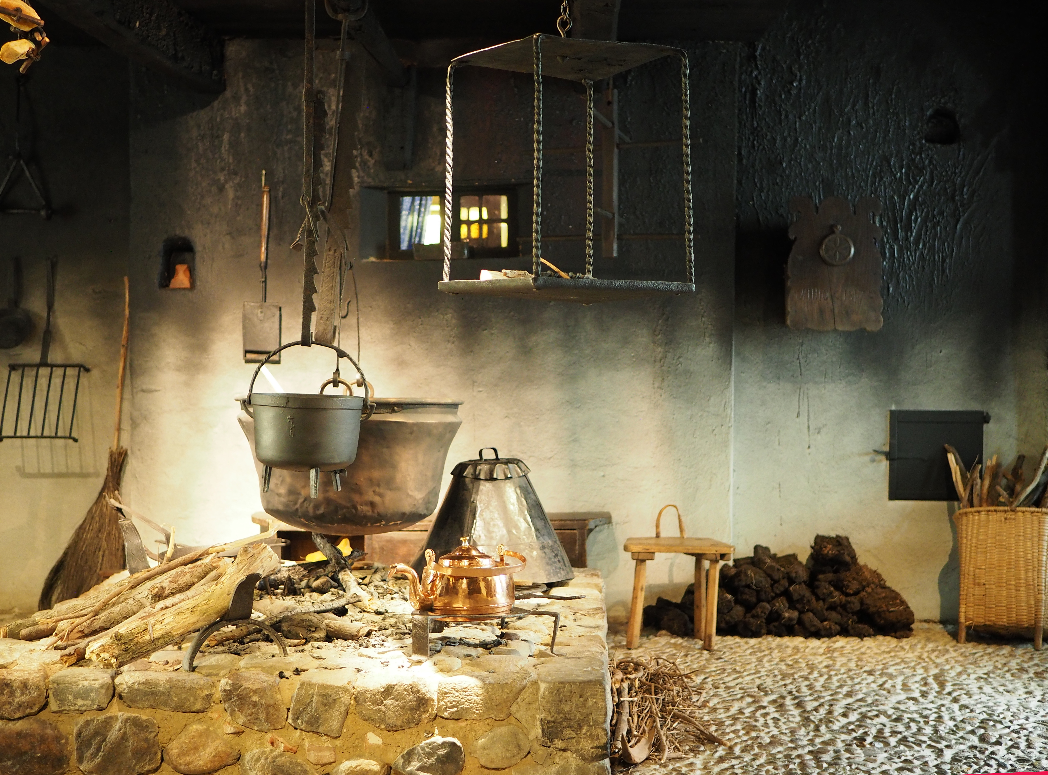 Innenraum des Niedersachsen–Bauernhauses im Bomann-Museum Celle